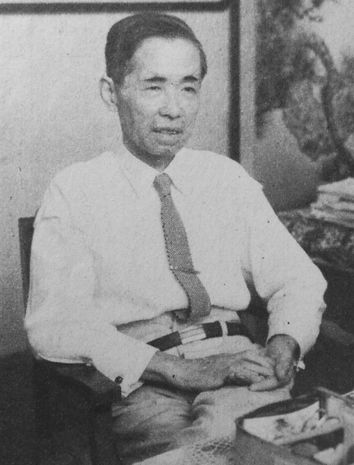 下村定